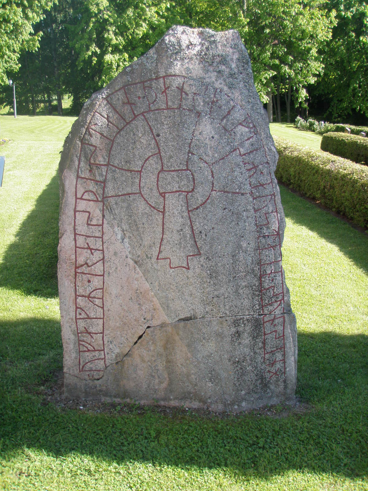 Dess text lyder: "Ofag reste denna sten efter Östen, sin son".